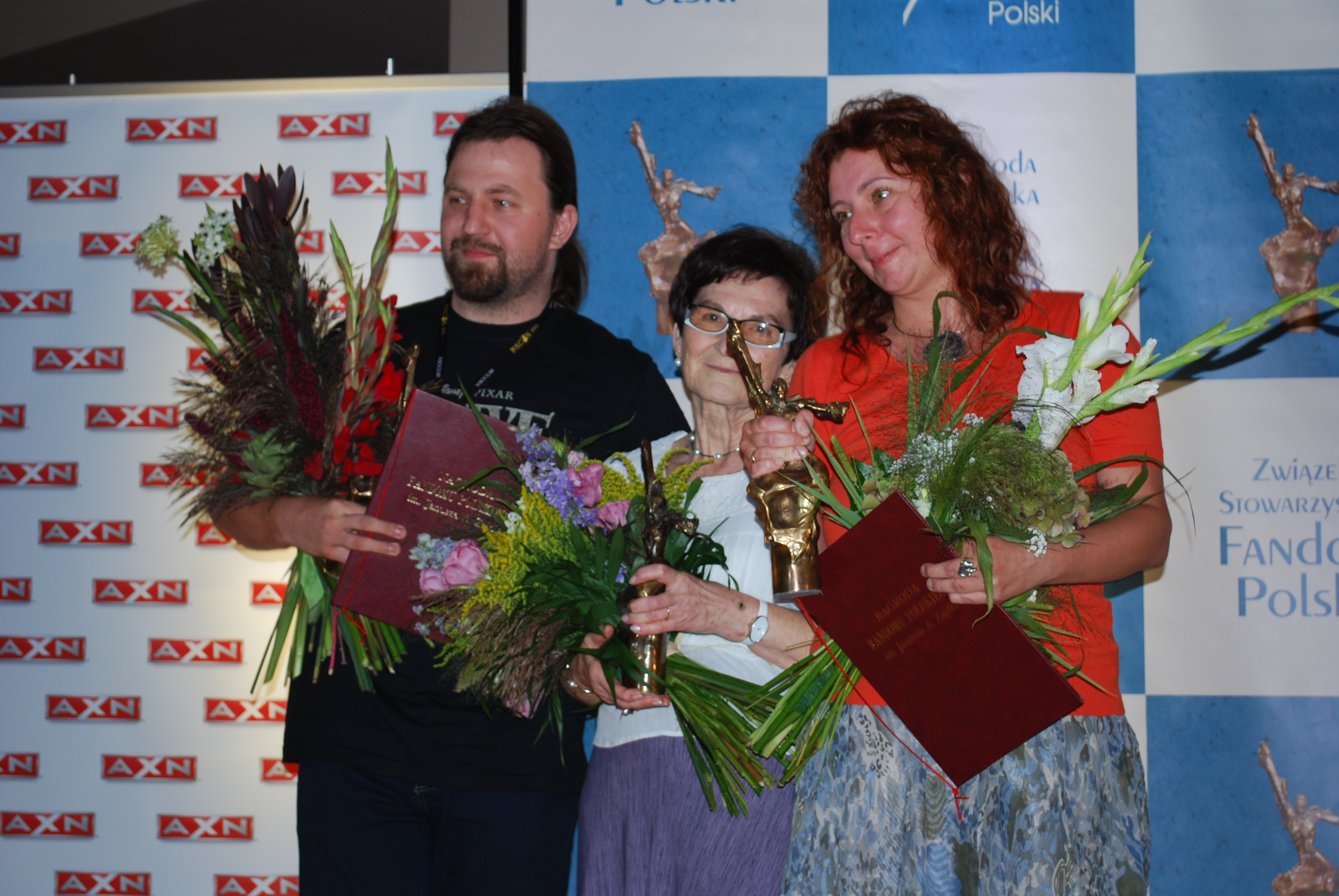 Laureaci Nagrody im. Janusza A. Zajdla: Jakub Ćwiek, Jadwiga Zajdel (odbierająca statuetkę dla pierwszego laureata nagrody, Janusza A. Zajdla), Maja Lidia Kossakowska